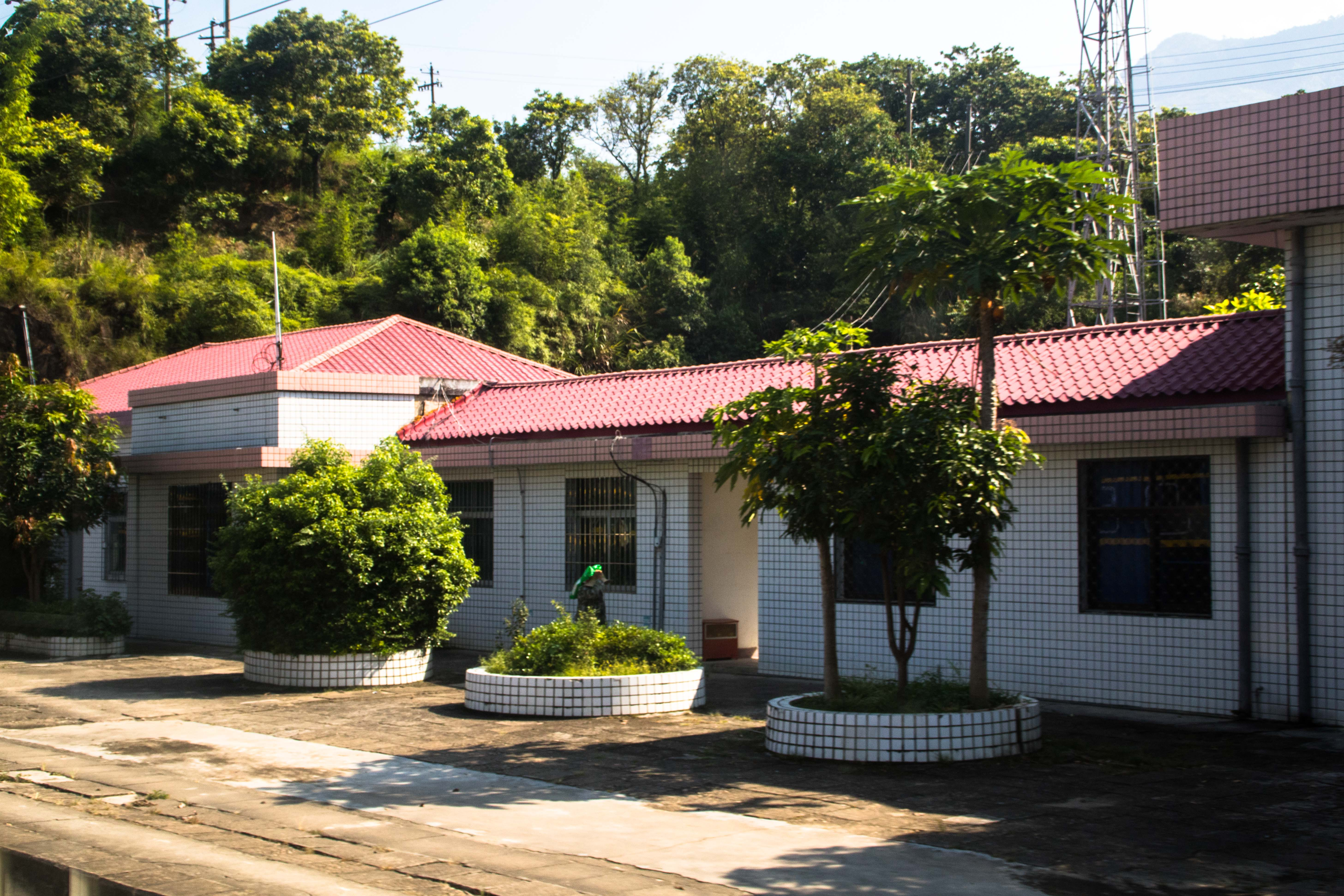 中文（中国大陆）: 大箬站站房